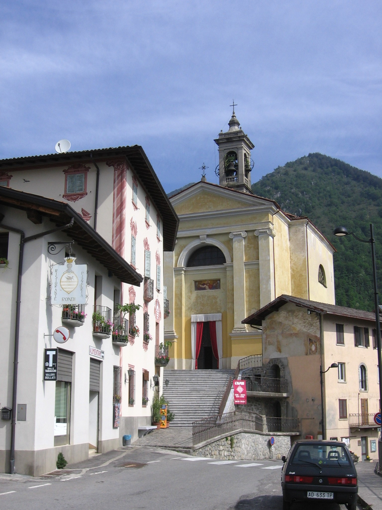 parrocchia di Bracca, Bergamo, Italia